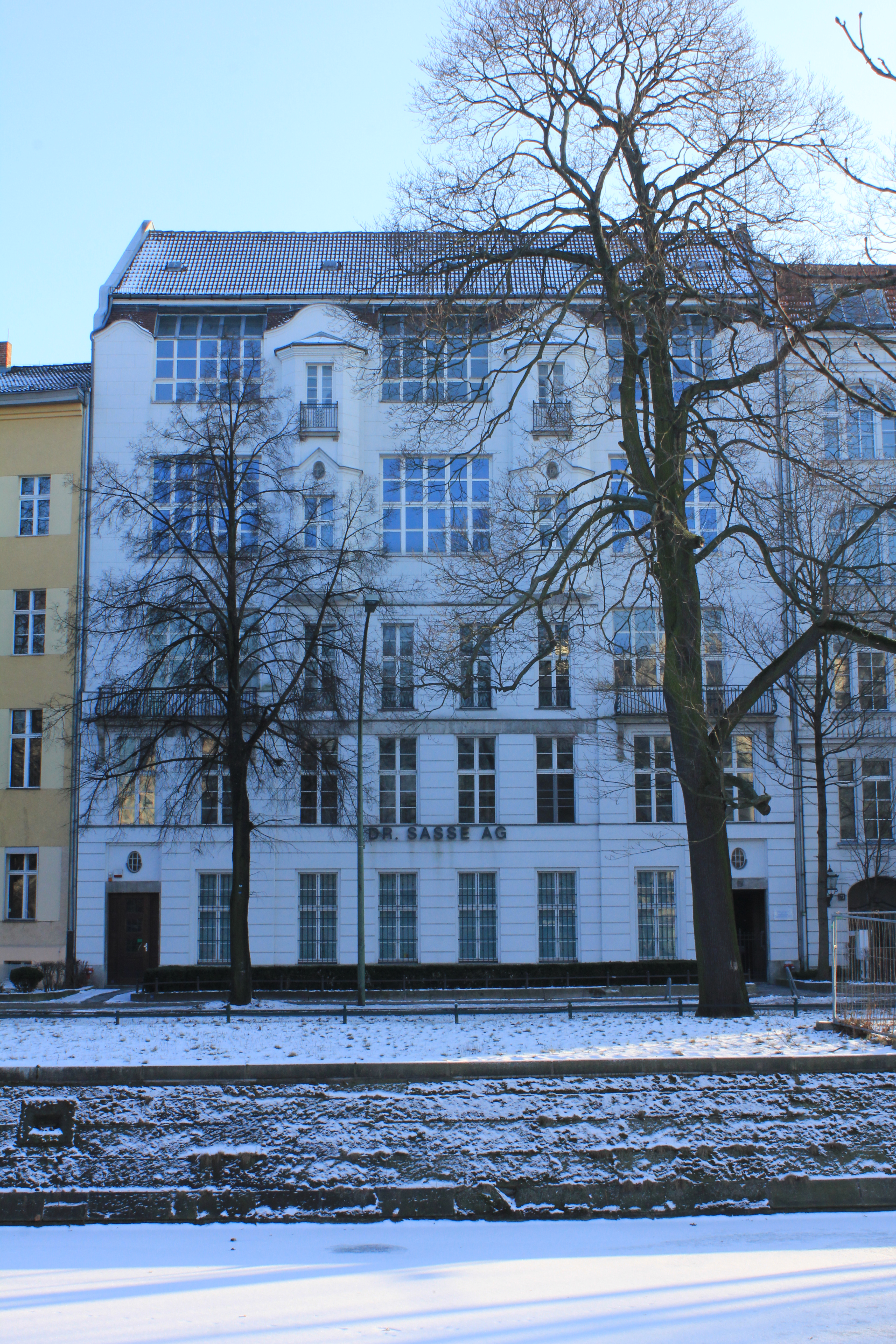 Atelierhaus des Vereins Berliner Künstlerinnen 1910-11 von Heinrich Schweitzer